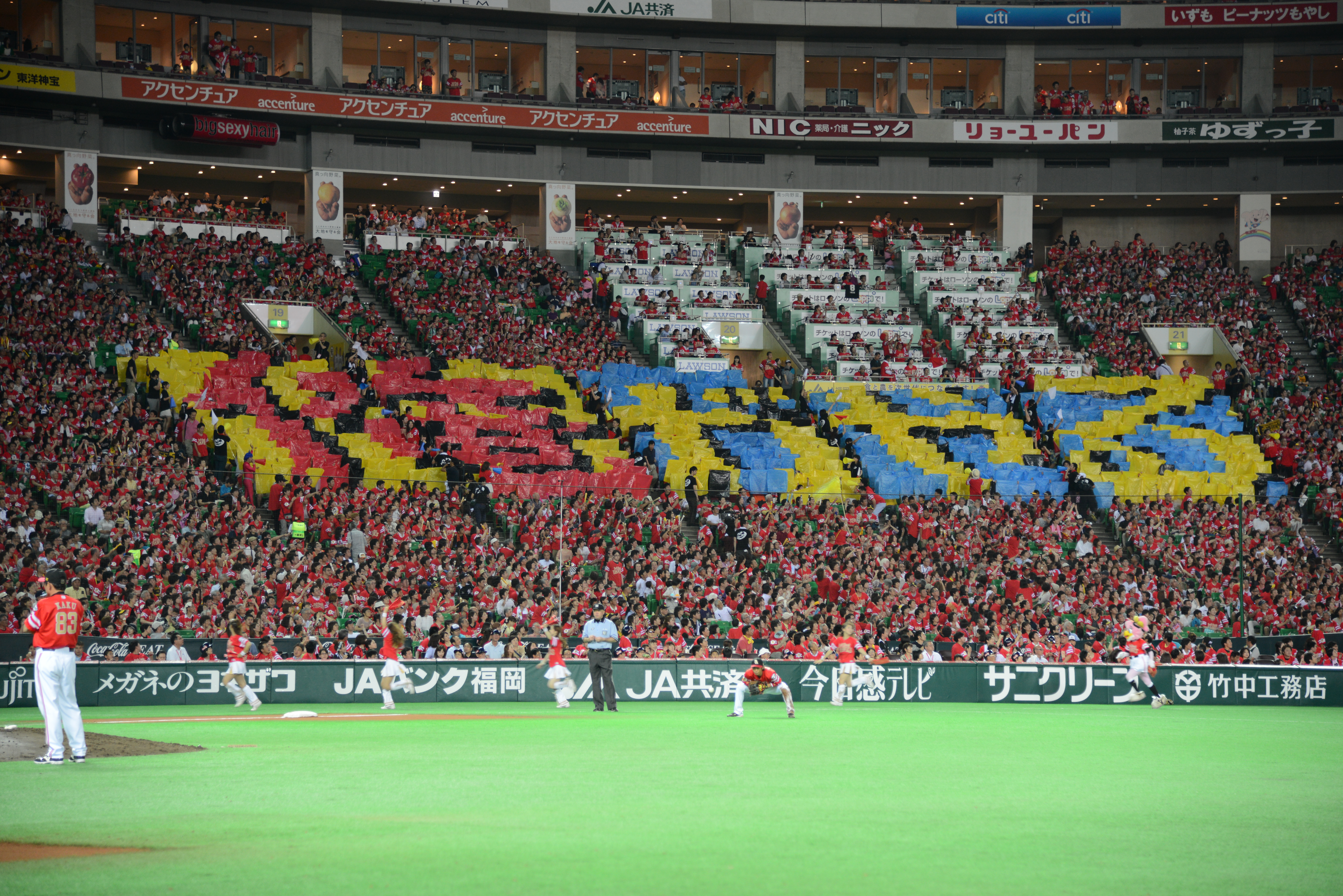 2014年度の "鷹の祭典" 。2014年7月23日福岡ヤフオク！ドームにて開催